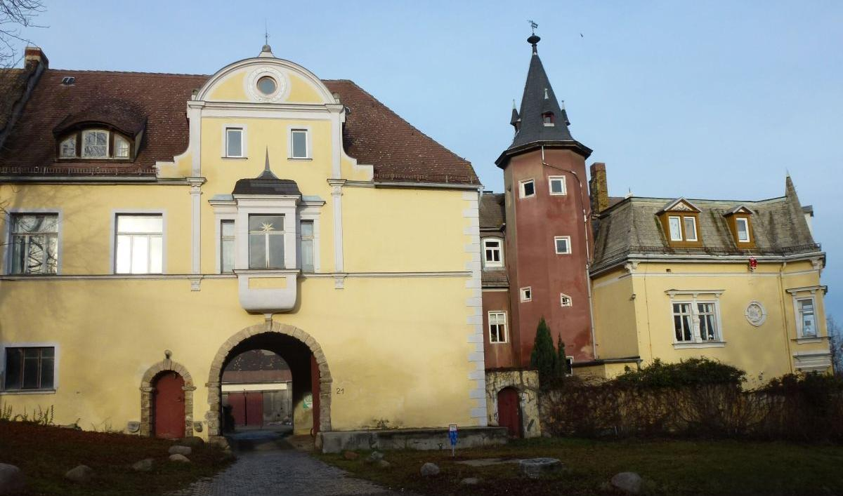 Gut in Wengelsdorf